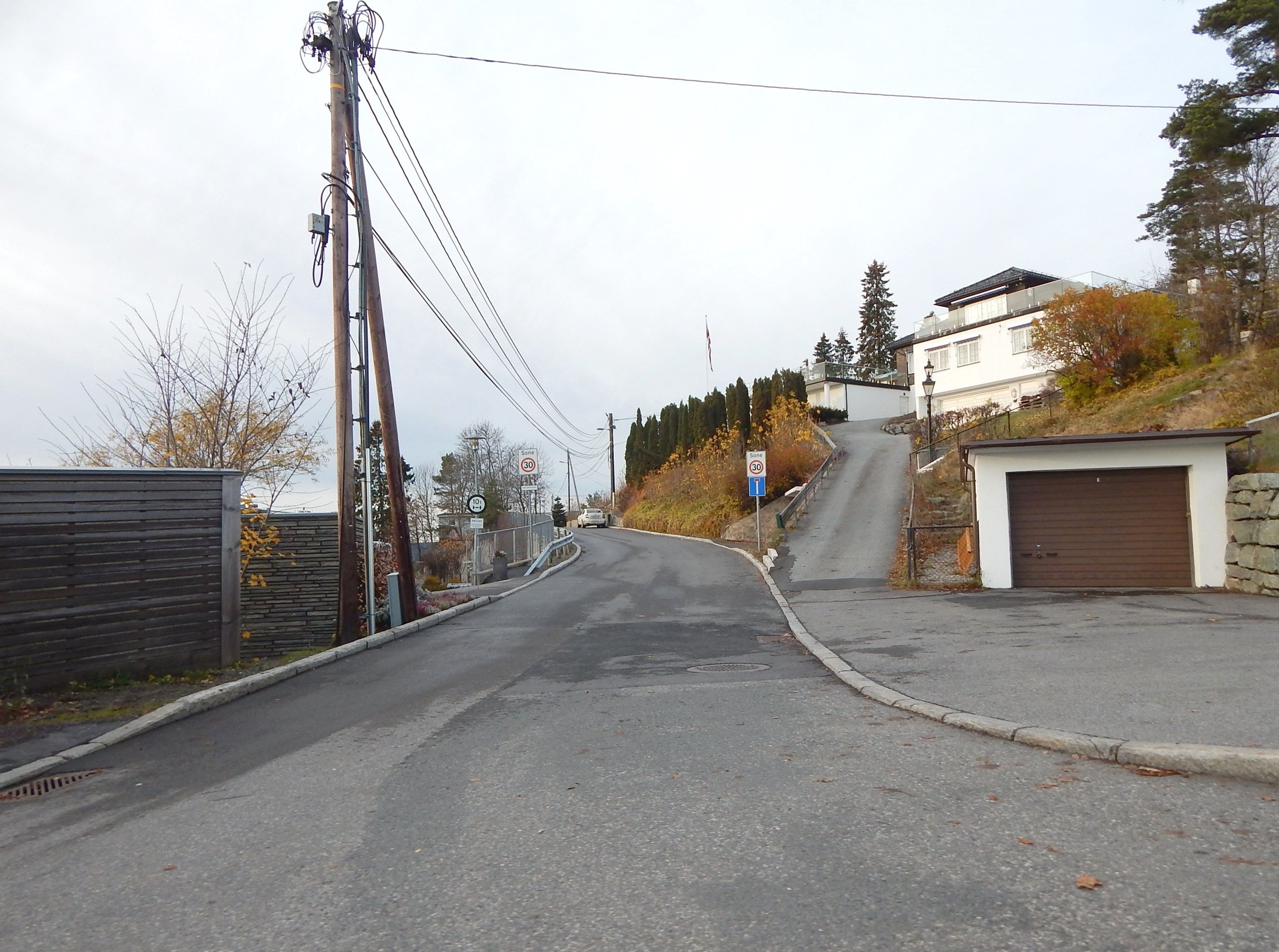 Oberst Angells vei sett fra Holmenkollveien